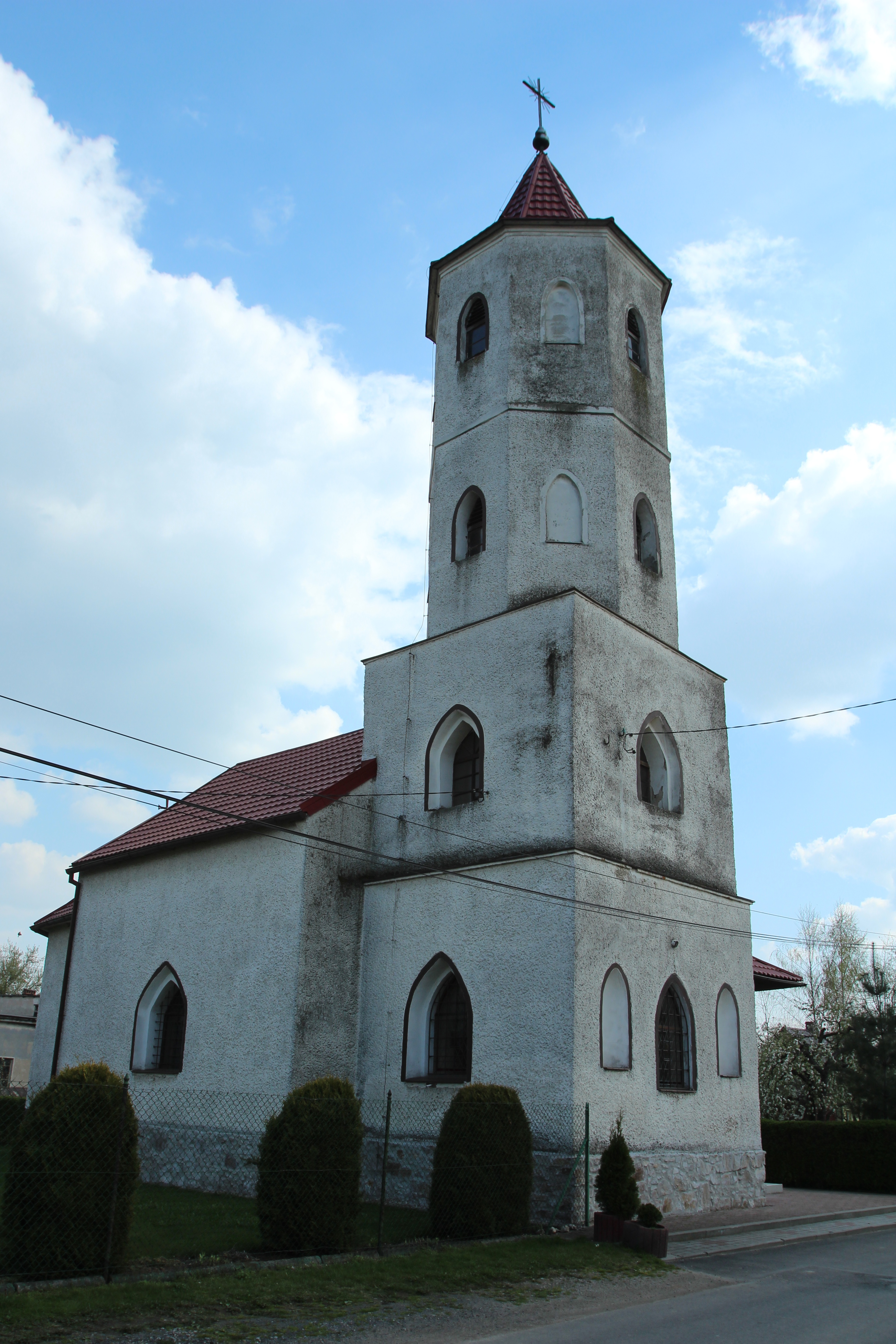 Wyszków Śląski – rzymskokatolicki kościół fililny pw. św. Jerzego, 1822-1824